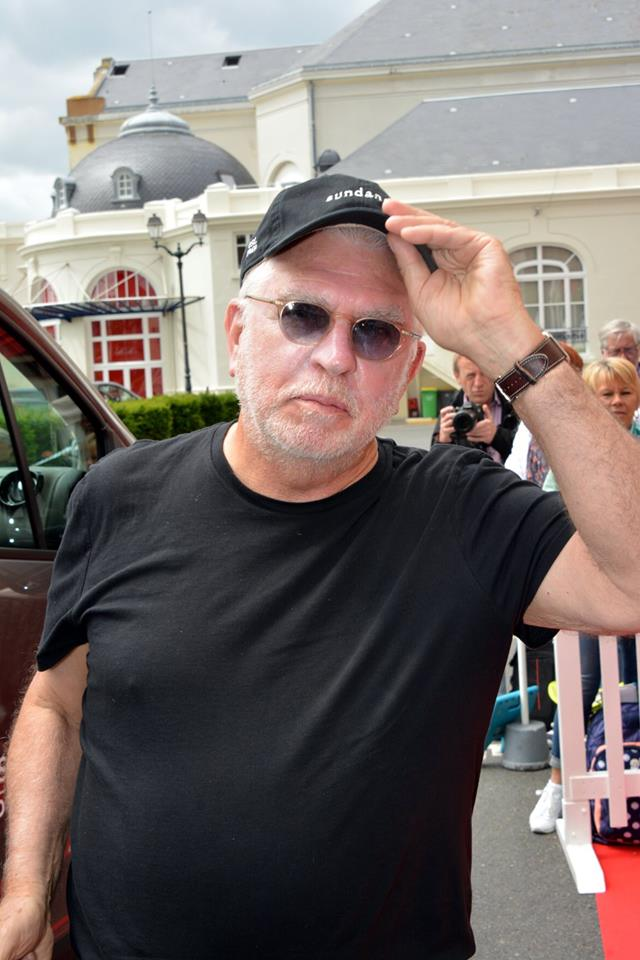 Bob Swaim au festival de Cabourg